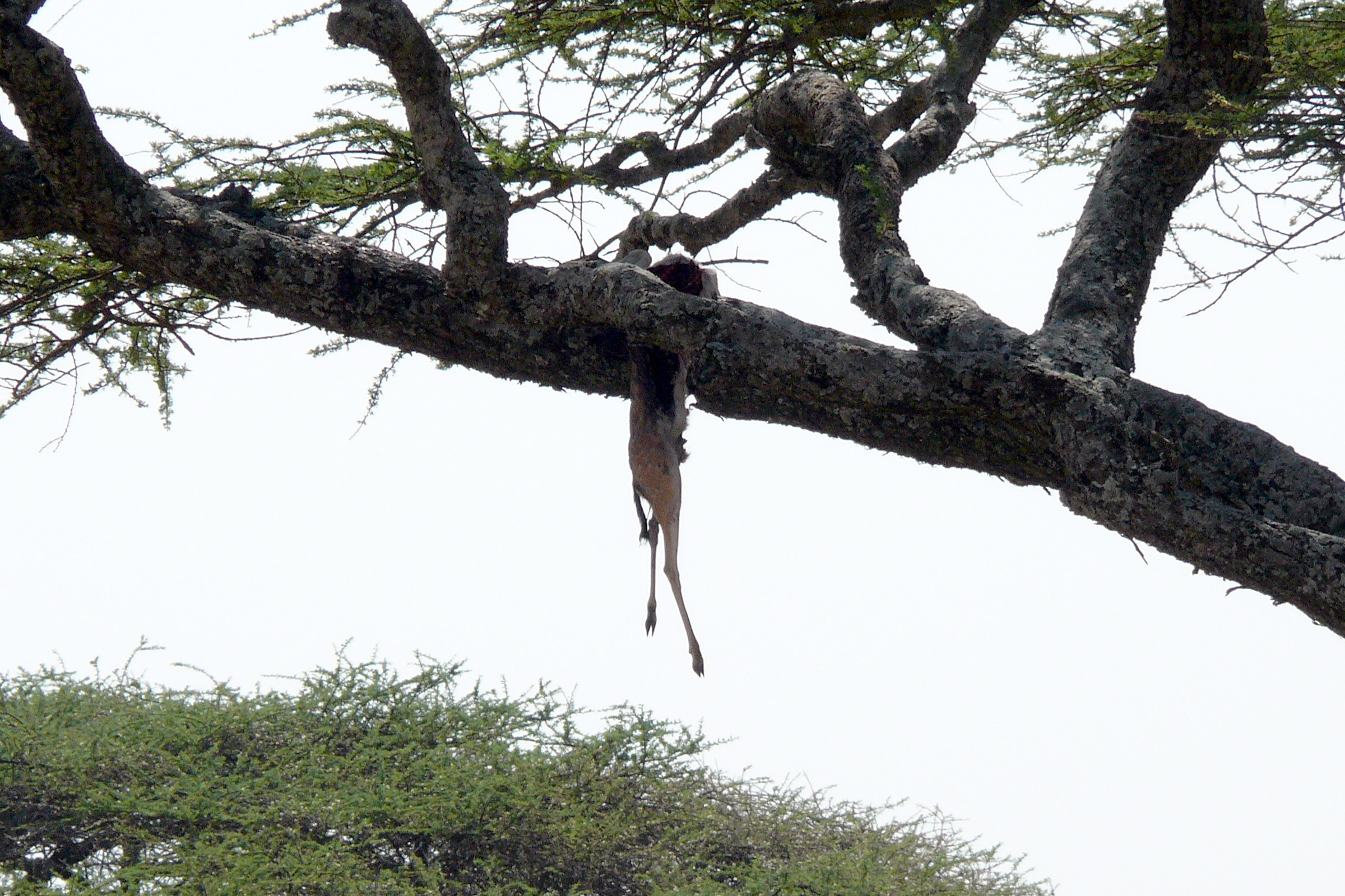 Leopardenbeute